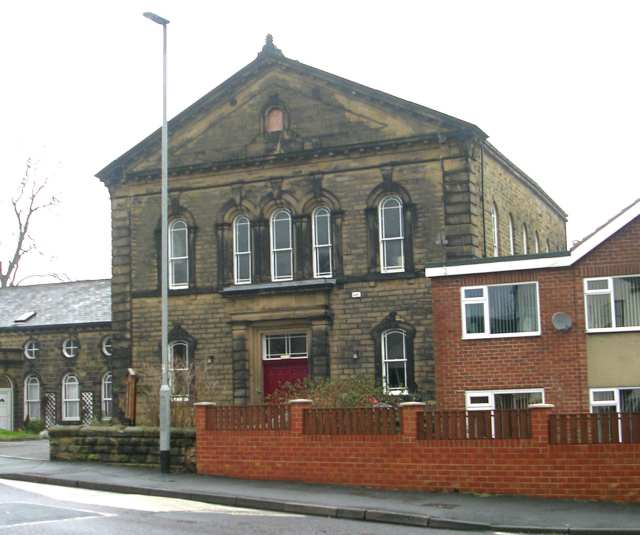 Gildersome Baptist Church - Church Street